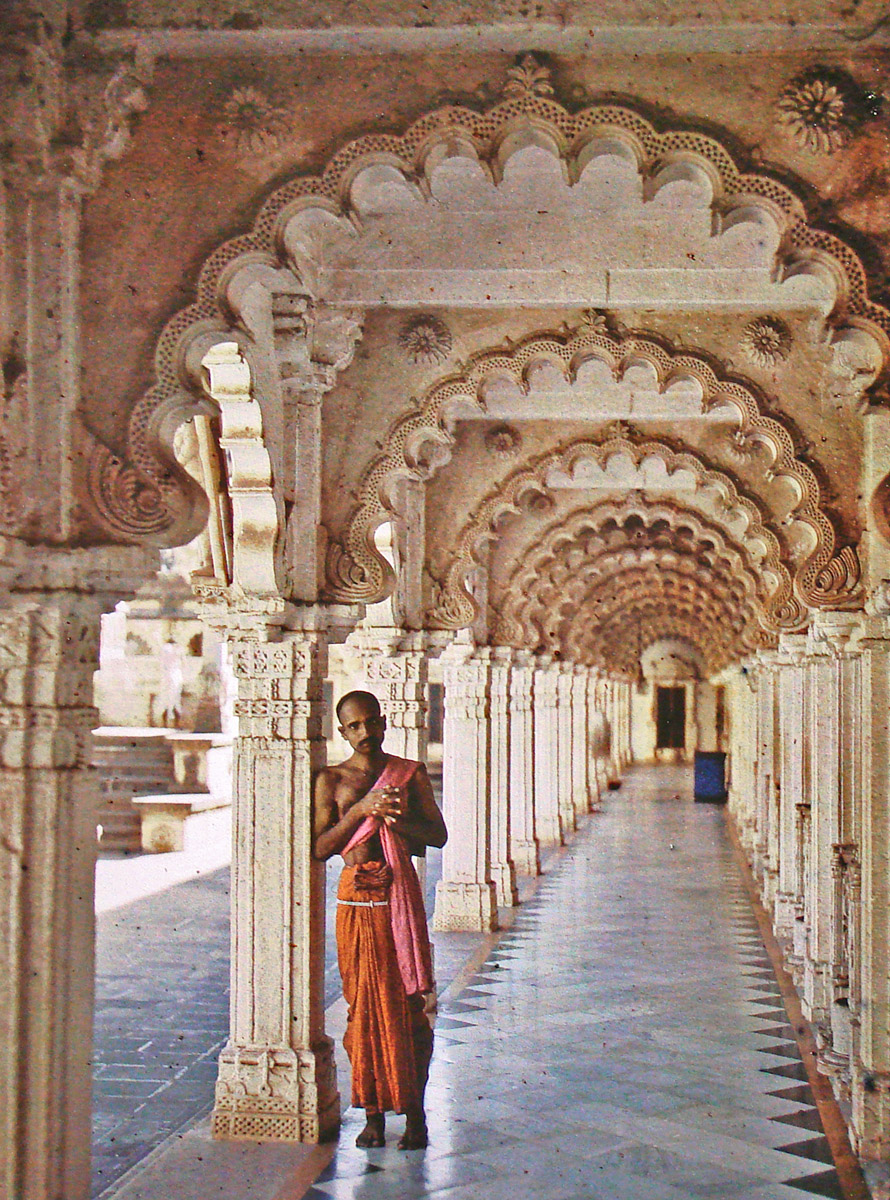 Photographie d'un autochrome Prêtre en tenue d'officiant (dhoti orange, torse nu) dans le temple jaïn de Hathi Singh Ahmedabad, 20/12/1913 inv. A 4 177 Exposition "Infiniment Indes" Musée Albert-Khan, Boulogne-Billancourt, 92 Portraits, scènes de vie, architecture… : les "Archives de la planète" représentent un témoignage photographique et cinématographique unique du quotidien des habitants du monde au début du XXe siècle. Les missions financées par Albert Kahn dans plus de 50 pays ont permis de réunir une collection exceptionnelle d’autochromes et de films en noir et blanc.